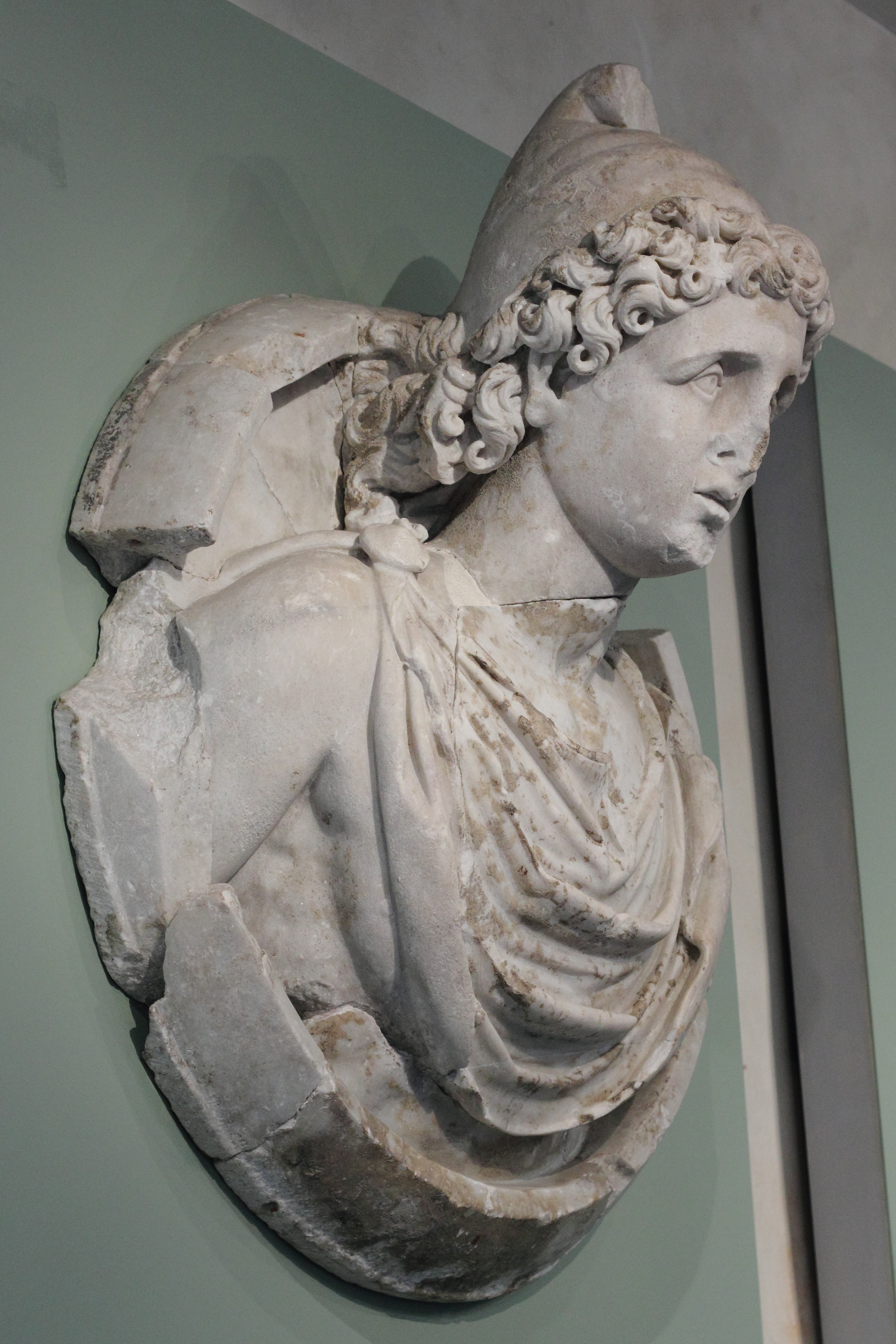 Musée Saint-Raymond Native nameMusée Saint-RaymondLocationToulouse, FranceCoordinates43° 36′ 28.33″ N, 1° 26′ 28.03″ E Established1891Web pagesaintraymond.toulouse.frAuthority control : Q1376 VIAF: 128969666 ISNI: 0000 0001 2323 4385 ULAN: 500311605 LCCN: n81055239 GND: 1091399-3 WorldCat institution QS:P195,Q1376